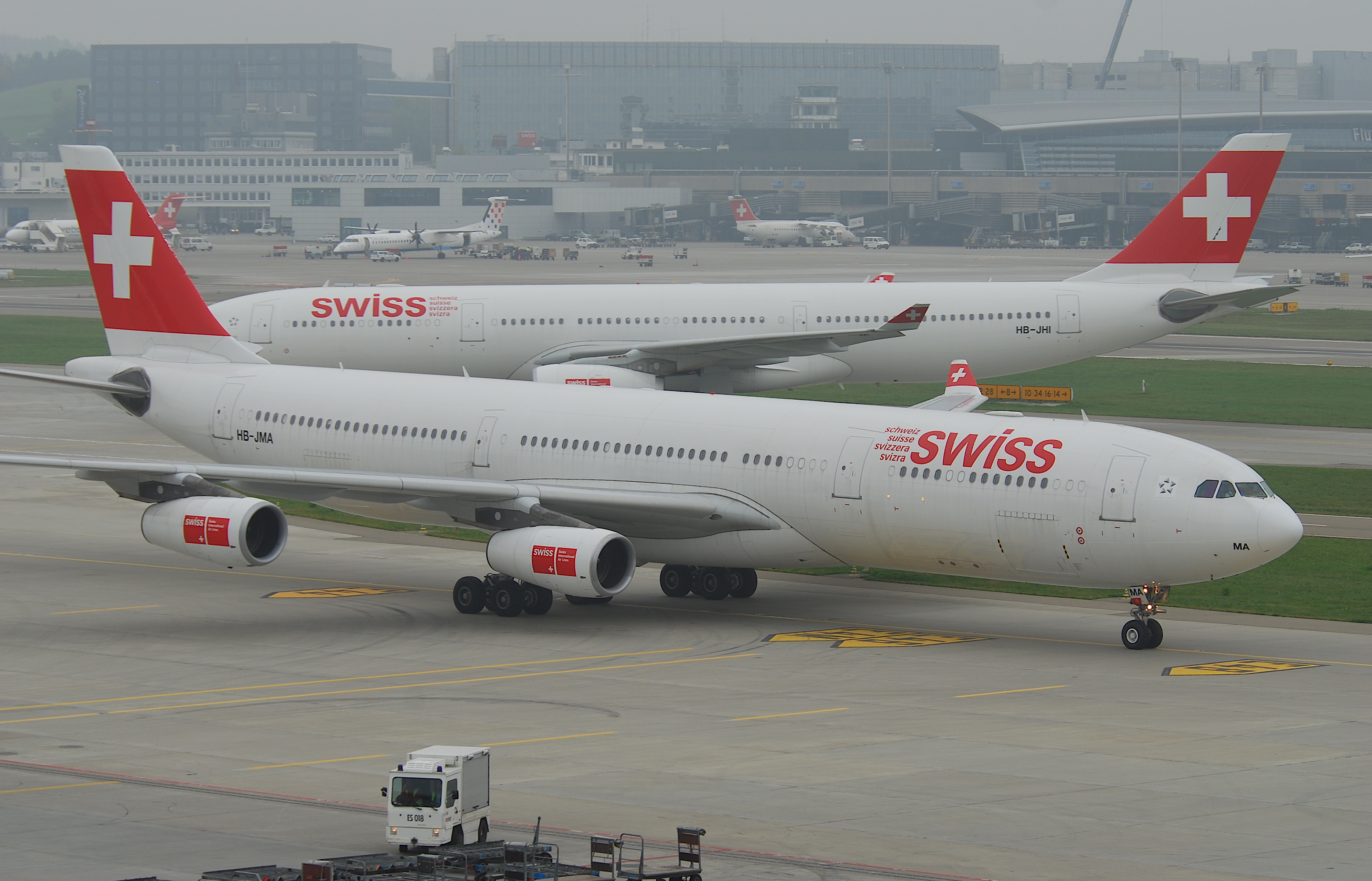 Swiss Airbus A340-313X; HB-JMA@ZRH;30.09.2011/619de